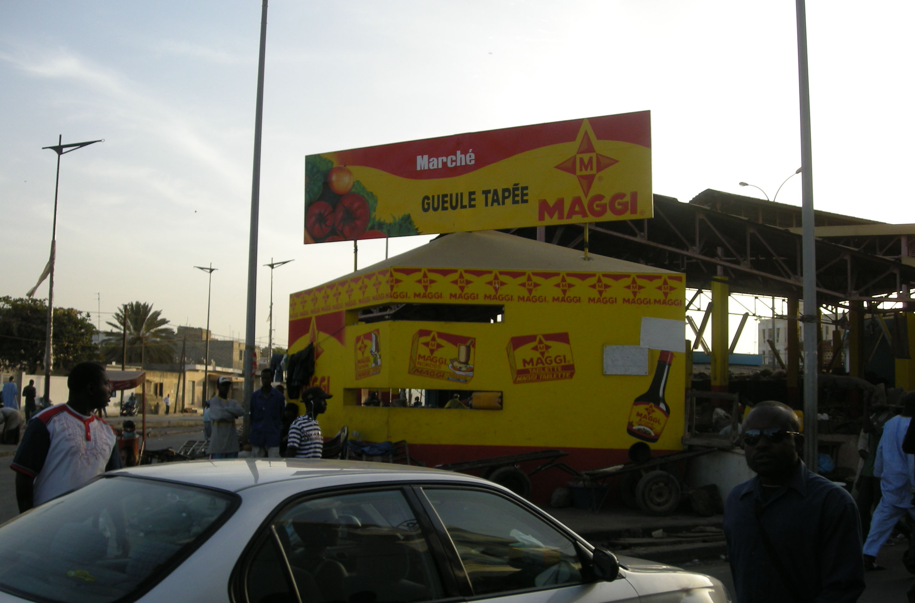 Le marché du quartier Gueule Tapée à Dakar (Sénégal)